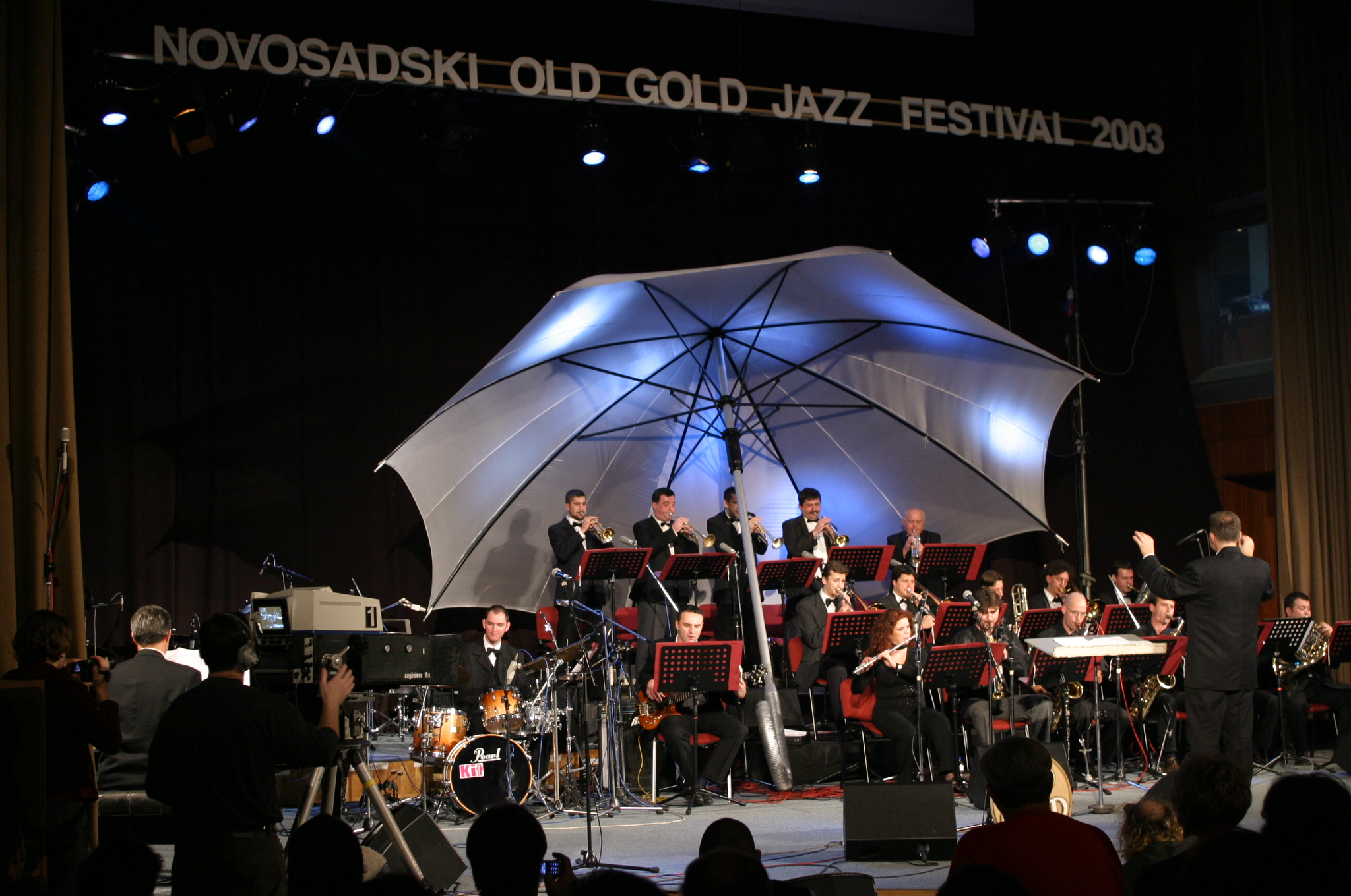 Novosadski Brass Orkestar-jazz fest Arhiva orkestra